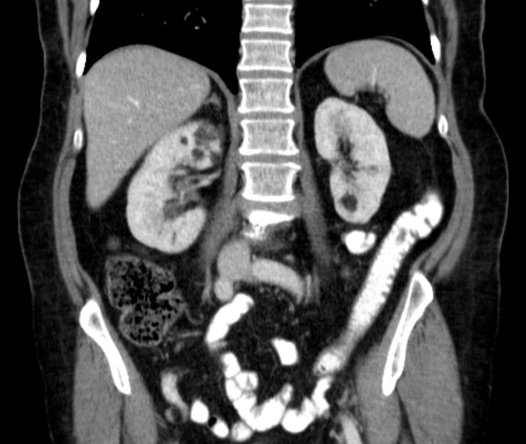 Computertomographie: Multiple Angiomyolipome der Nieren bei Patientin mit CT-Bild einer Lymphangioleiomyomatose der Lunge: Dringender Verdacht auf Tuberöse Sklerose.